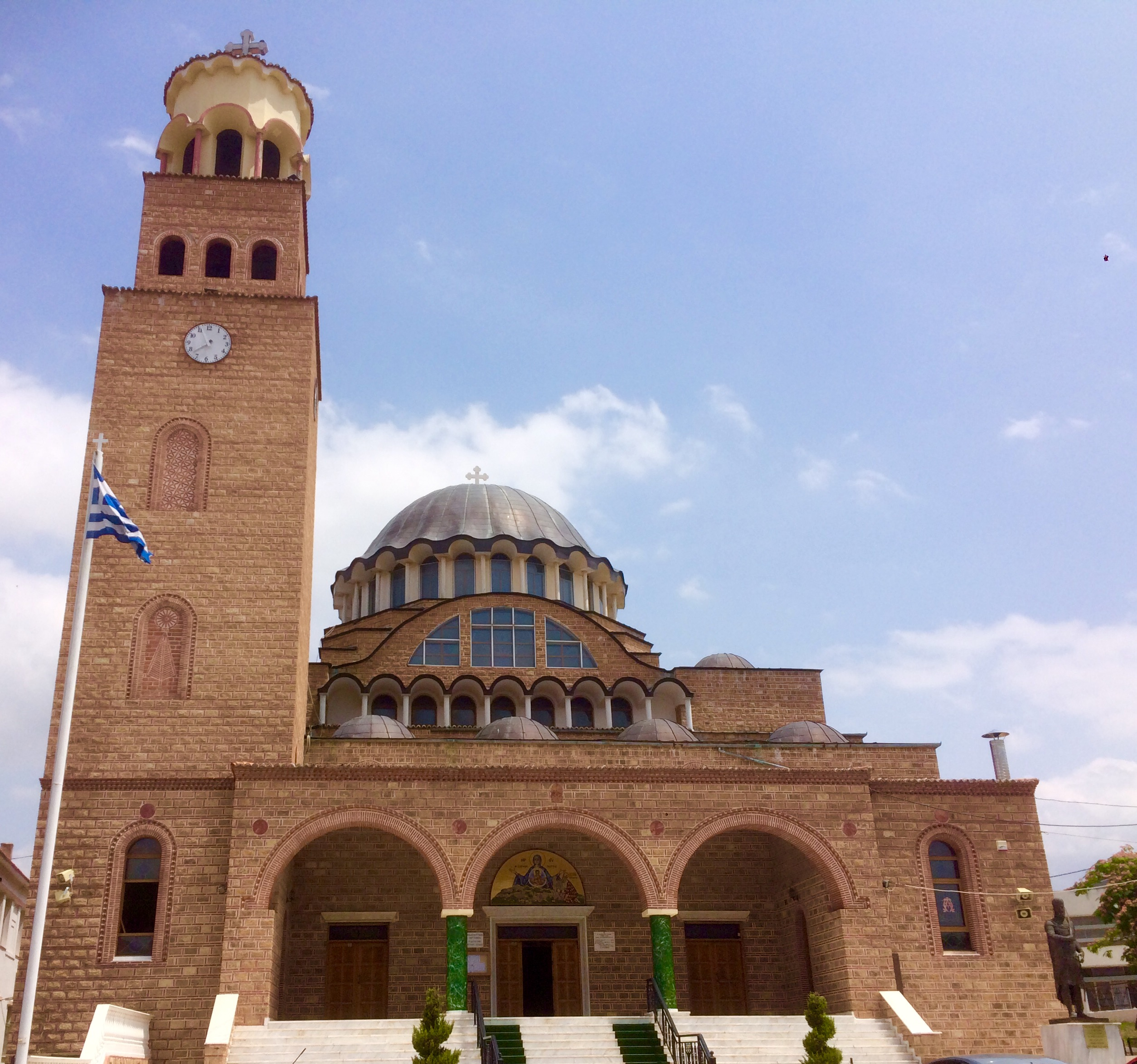 Der Dom Panagia Elefterotria in Didymoticho